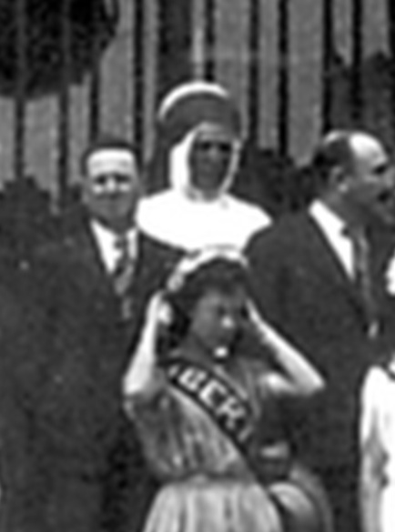 Mderiche